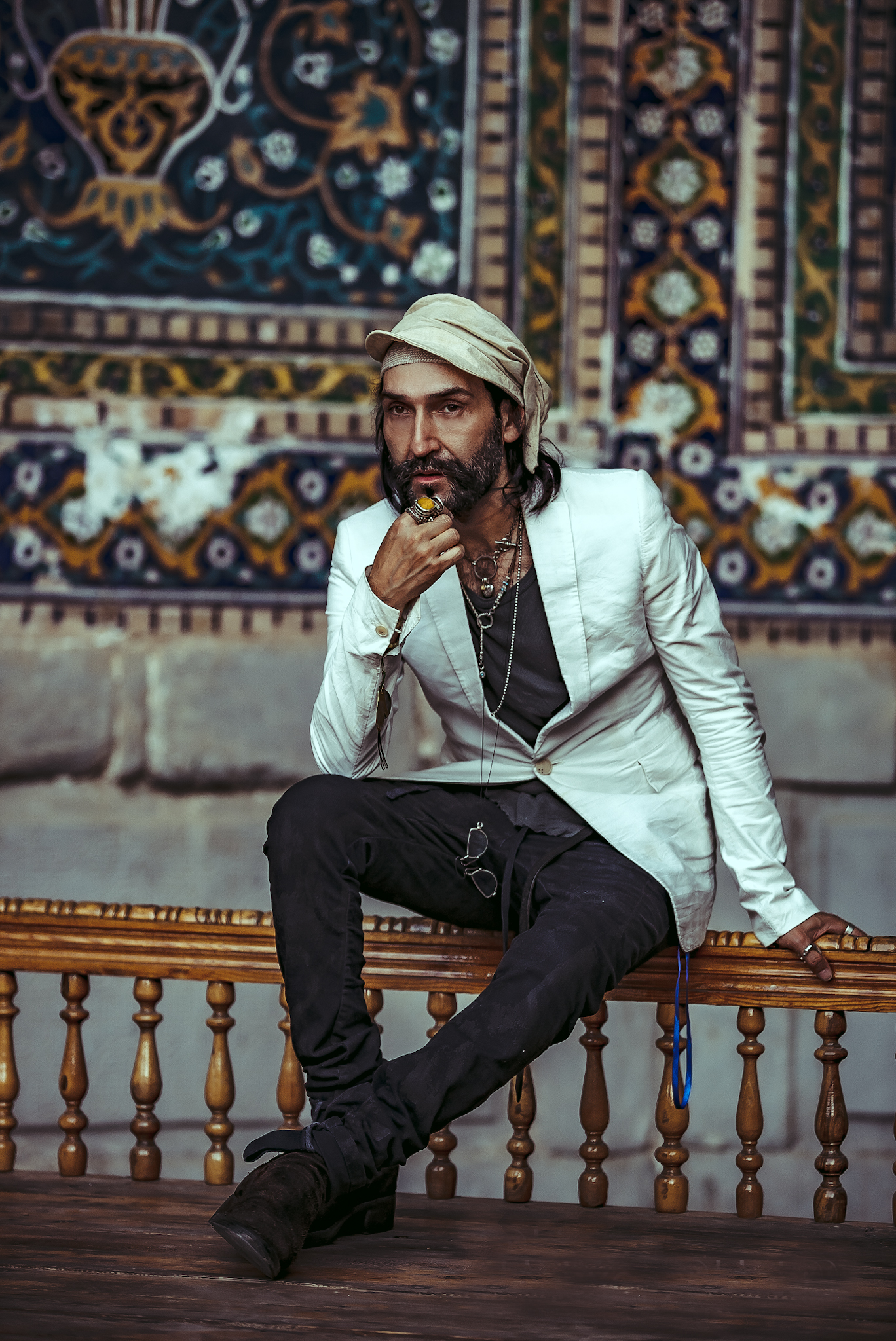 عکس توسط پوریا افخمی در سمرقند ثبت شده است.